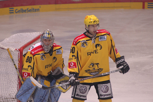 Richard Pavlikovsky im Trikot der Krefeld Pinguine 2006